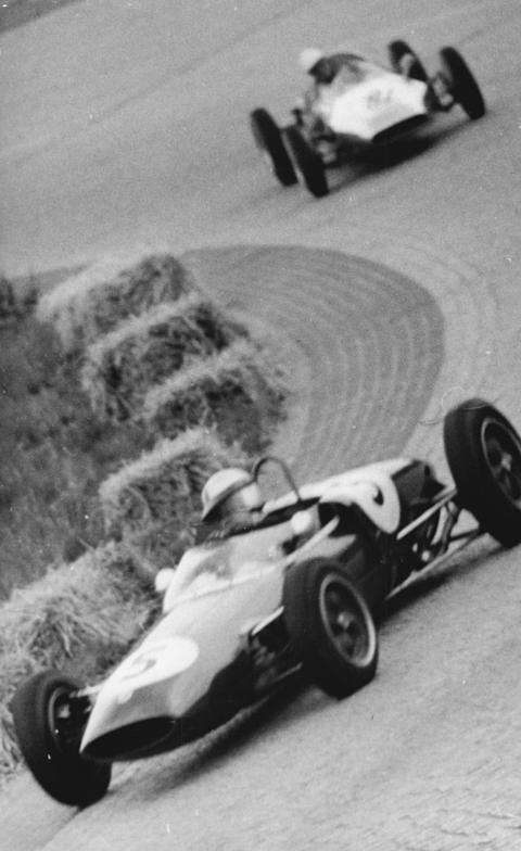 Zentralbild Kohls 20.5.1962 Auto- und Motorradrennen auf der "Bernauer Schleife" Am 20.5.1962 wurde auf der "Bernauer Schleife" das 8. Auto- und Motorradrennen ausgetragen. Sportler aus Frankreich, Finnland, Polen, Belgien und der DDR gaben sich ein Stelldichein. UBz: Mit sicherem Vorsprung gewann der Finne Leo Mattila (vorn) das international besetzte Rennen der Formel Juniorwagen."